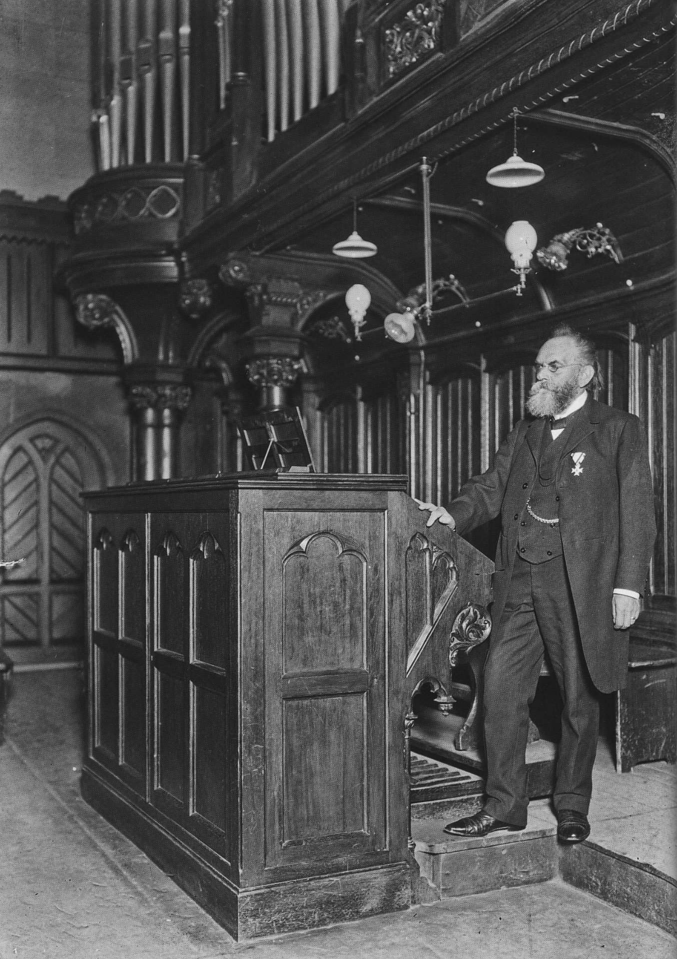 Professor Moritz Vogel (1846-1922) an der Orgel der Matthäikirche.